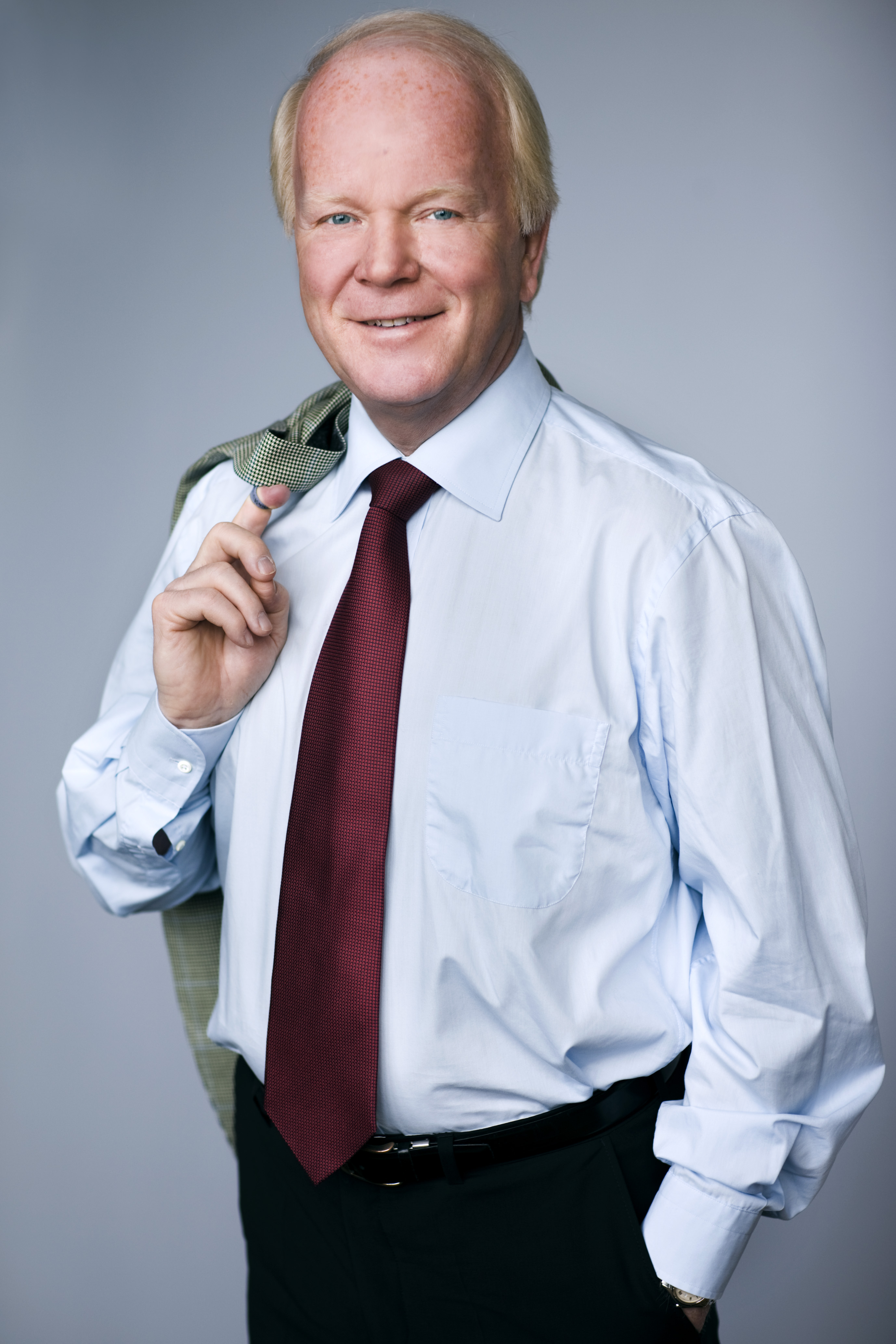 Kurt Eliasson vid en fotografering april 2009